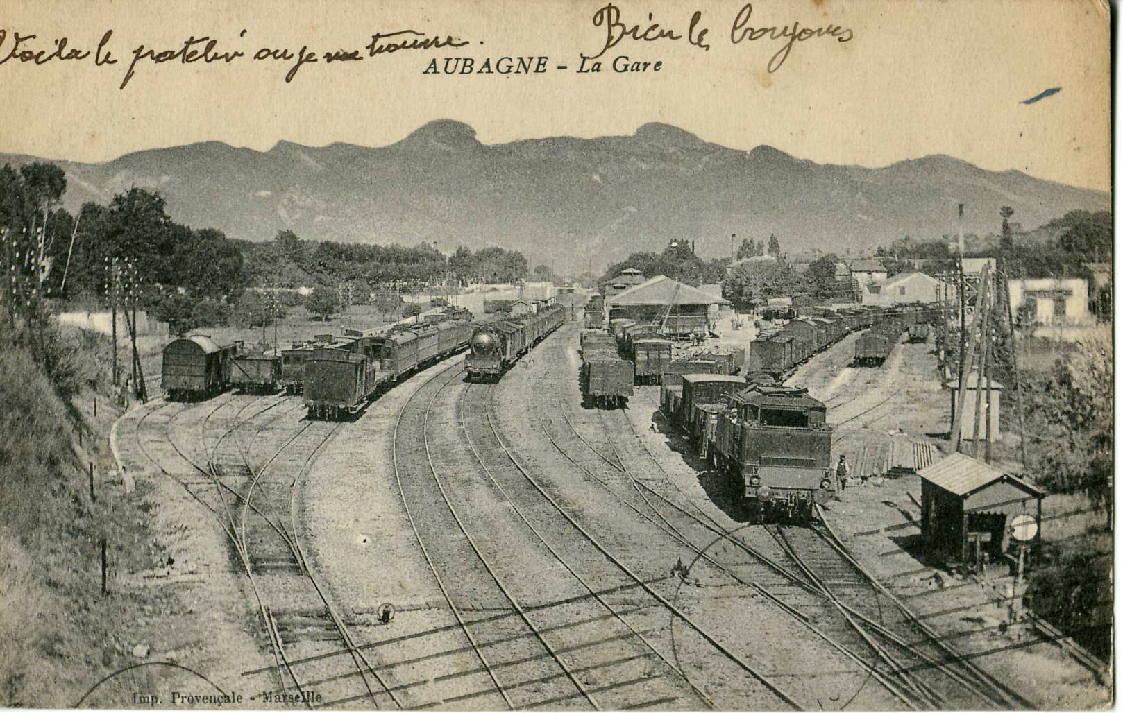 Carte postale ancienne éditée par l'Imprimerie Provençale à Marseille : AUBAGNE - La Gare